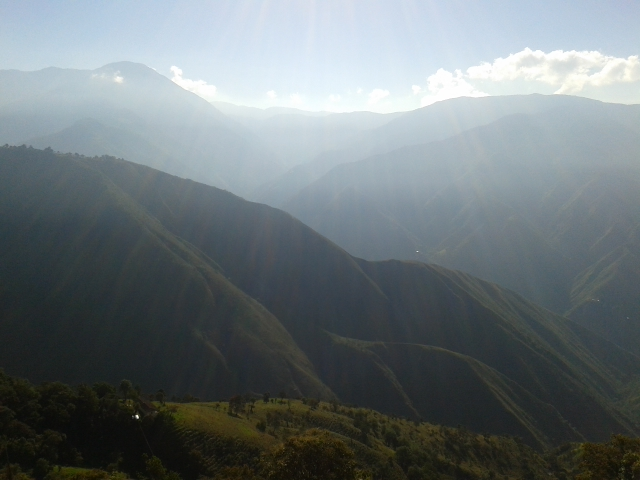 Esta fotografía fue tomada en el municipio colombiano con código 68705.